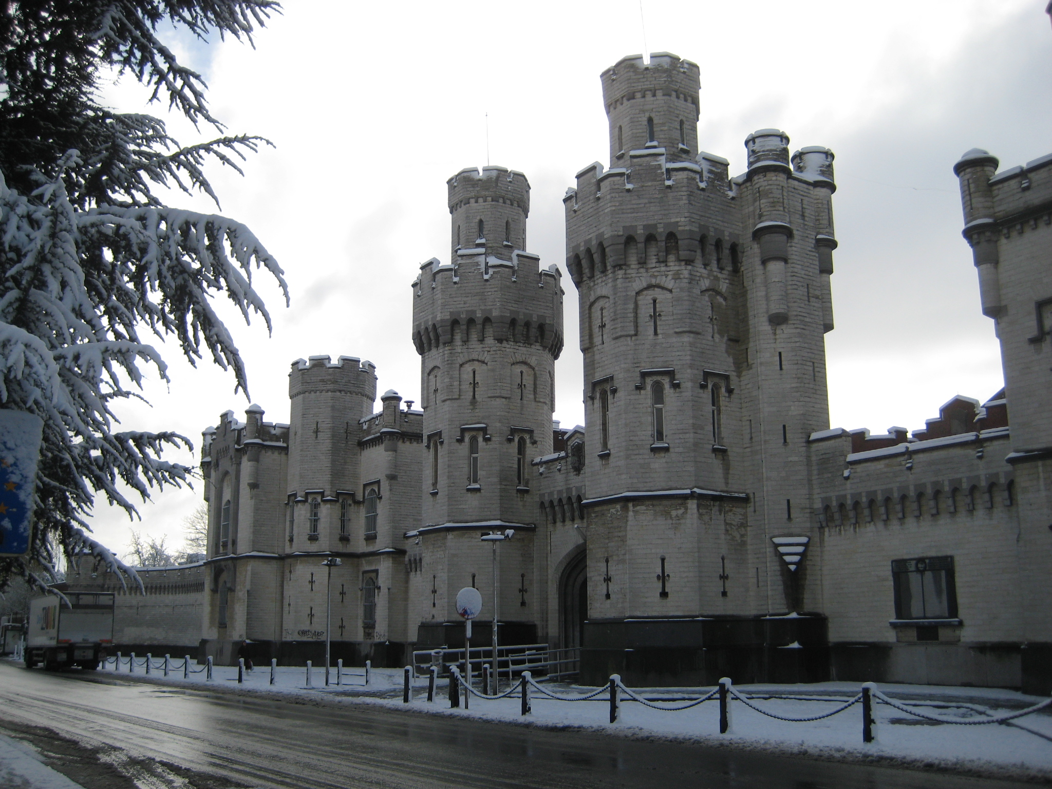 Prison de Saint-Gilles (Bruxelles)